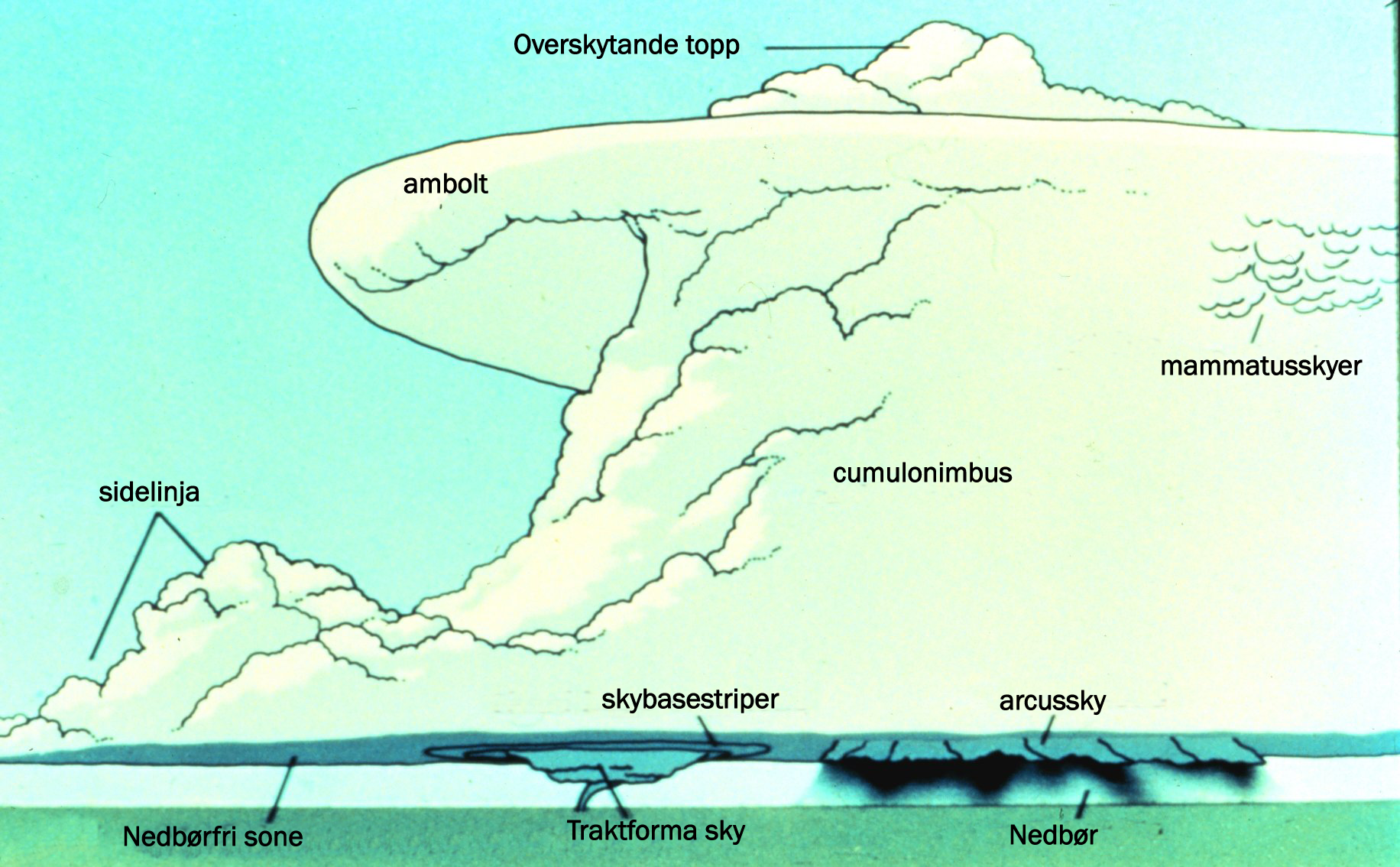 Tekst på figur er oversatt frå engelsk til nynorsk.